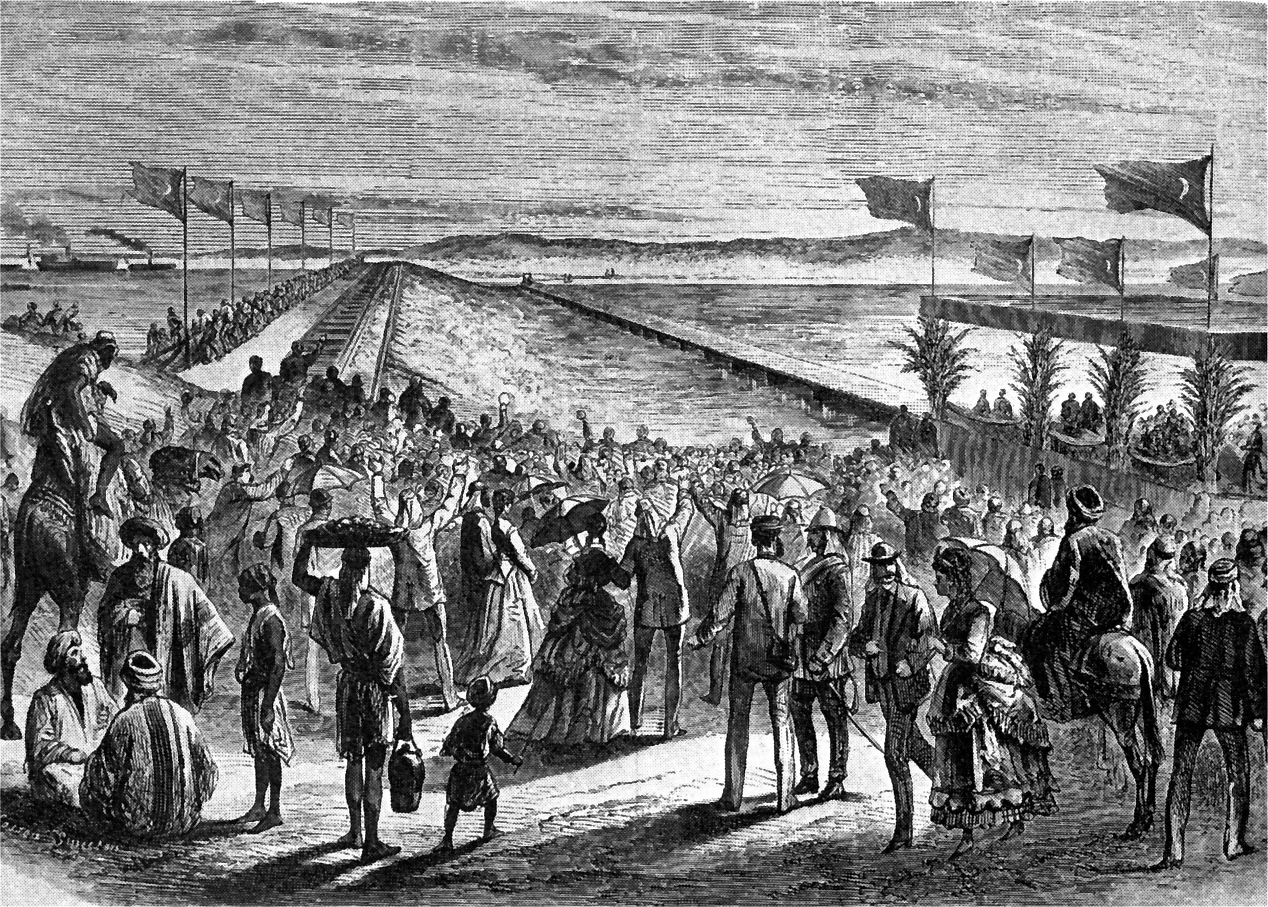 Eröffnung des Suezkanal 1869